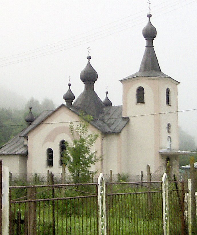 Vojtovce, Grécko-katolícky kostol